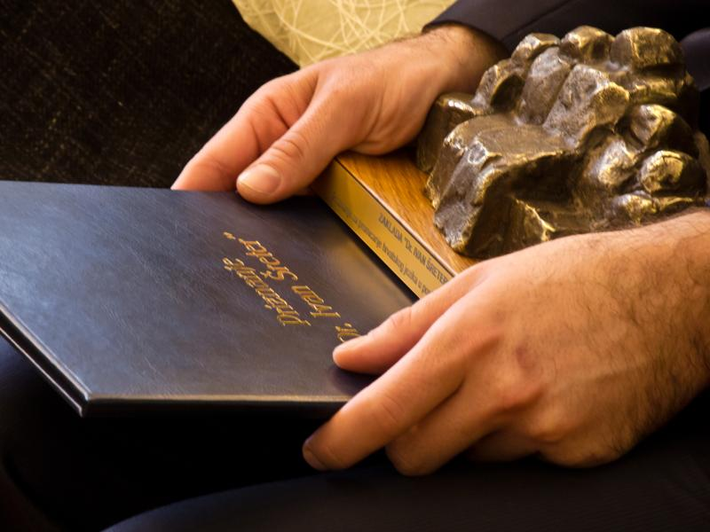 Dodjela Nagrade Dr. Ivan Šreter u Lipiku